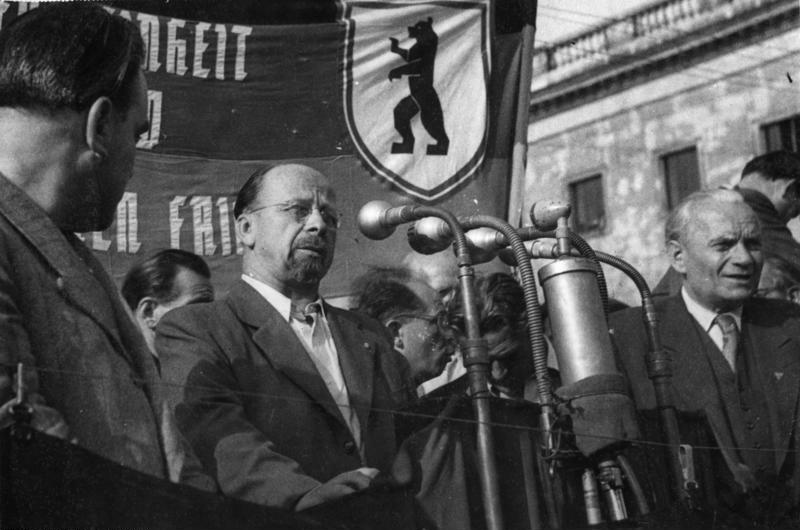 Ansprache von Walter Ulbricht Tag des Friedens: 1. Sept. 1949 in Berlin Wolfgang Ulbricht spricht. Rechts Bürgermeister [?] Geschke. Abgebildete Personen: Ulbricht, Walter: Staatsratsvorsitzender, Erster Sekretär des Zentralkomitees (ZK) der SED, Vorsitzender des Nationalen Verteidigungsrates, DDR